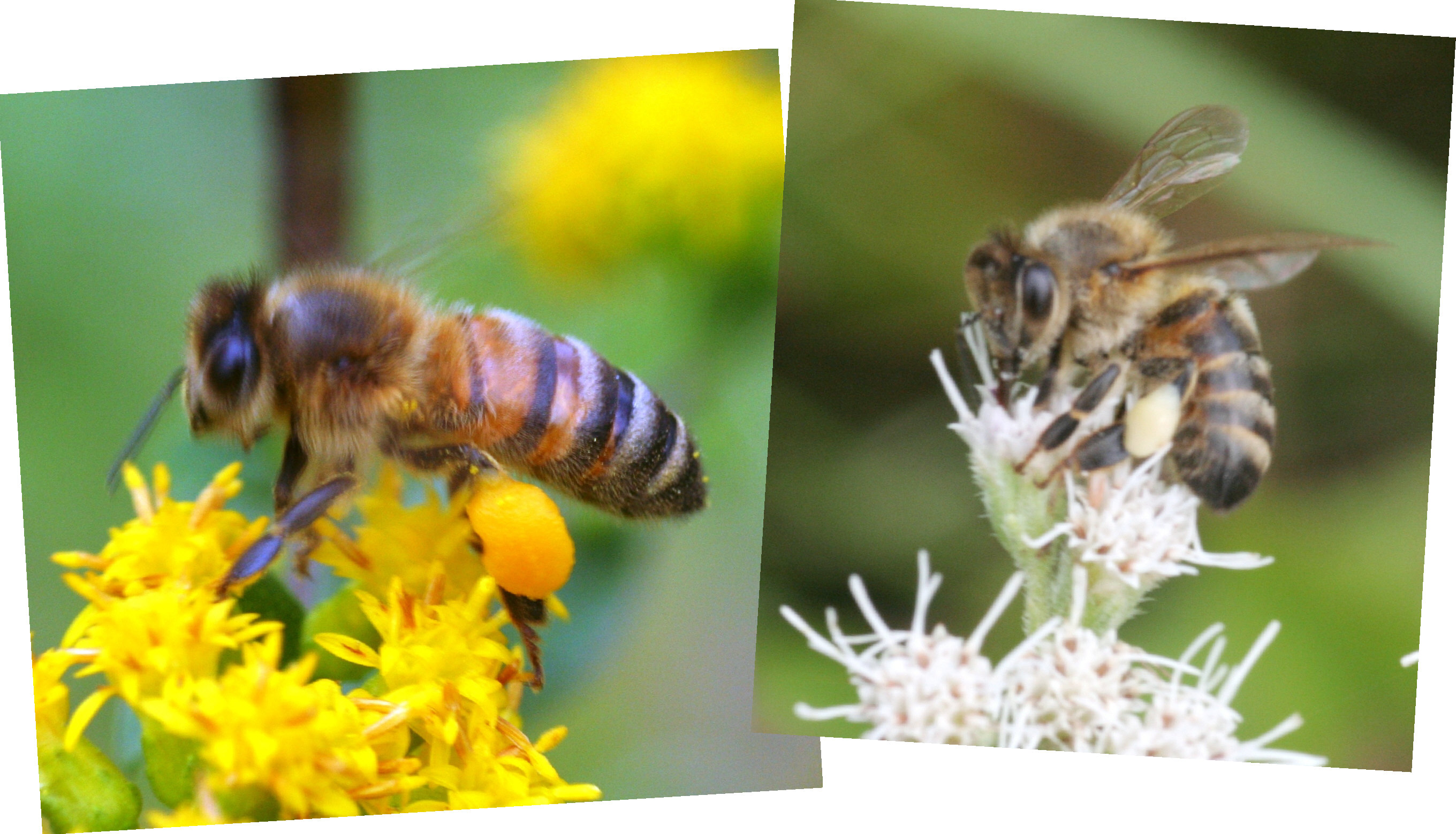 Pollinator constancy